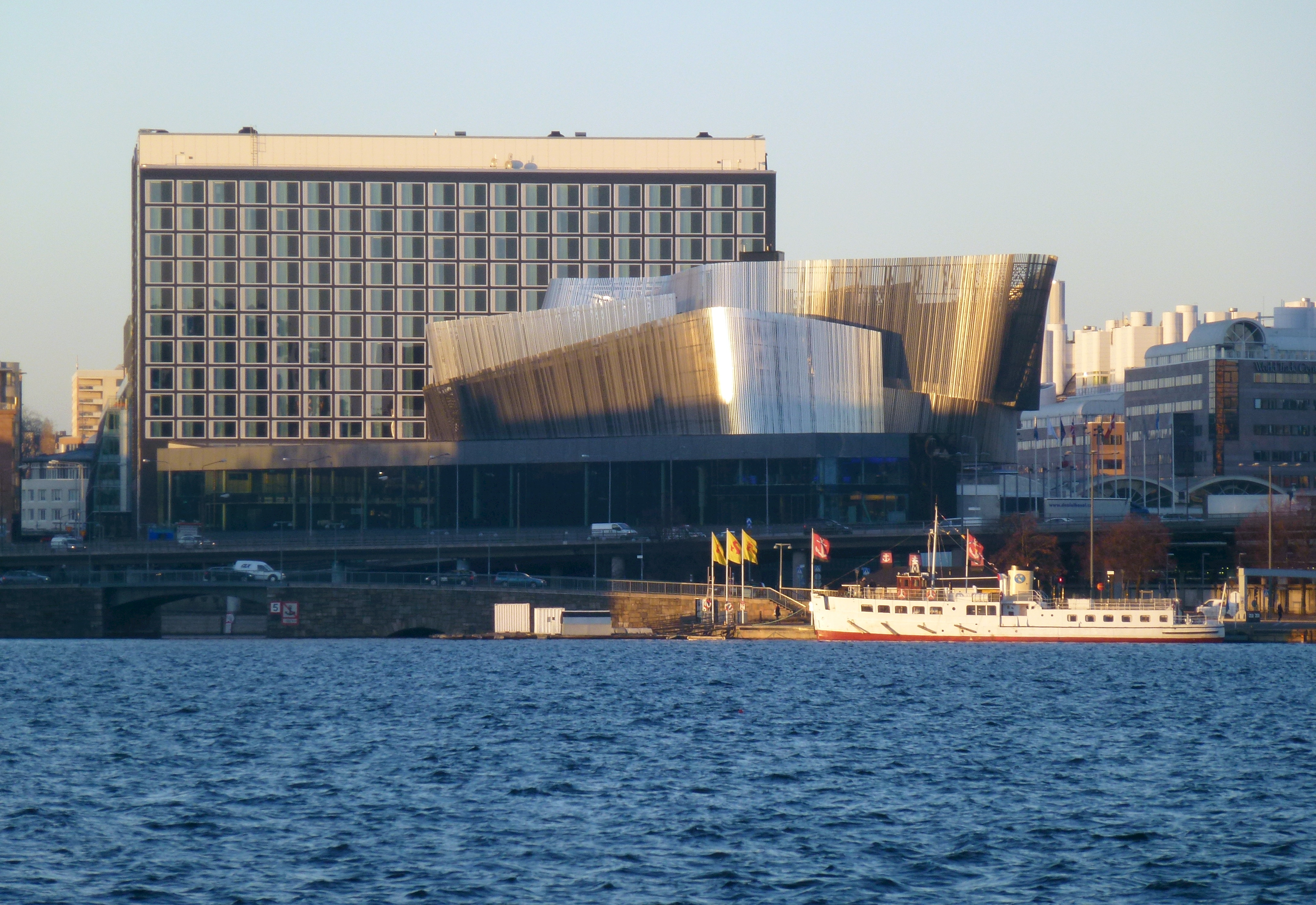 Stockholm Waterfront från Söder Mälarstarnd